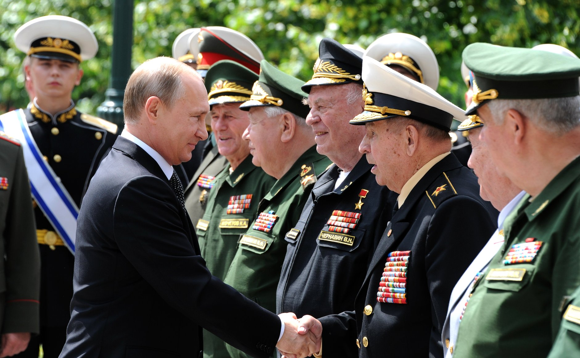 Возложение венка Президентом России Владимиром Путиным к Могиле Неизвестного Солдата в День памяти и скорби